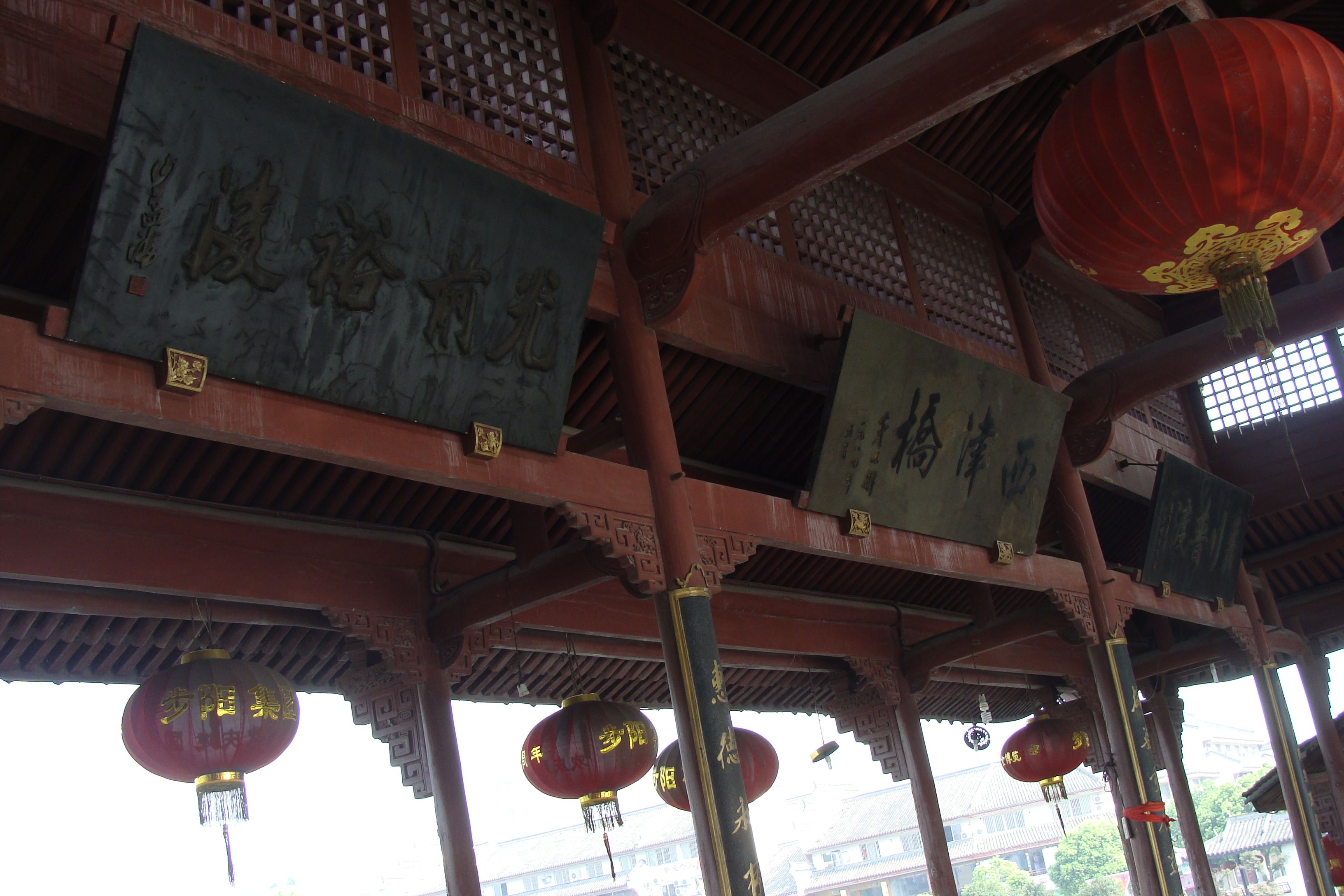 西津桥匾额